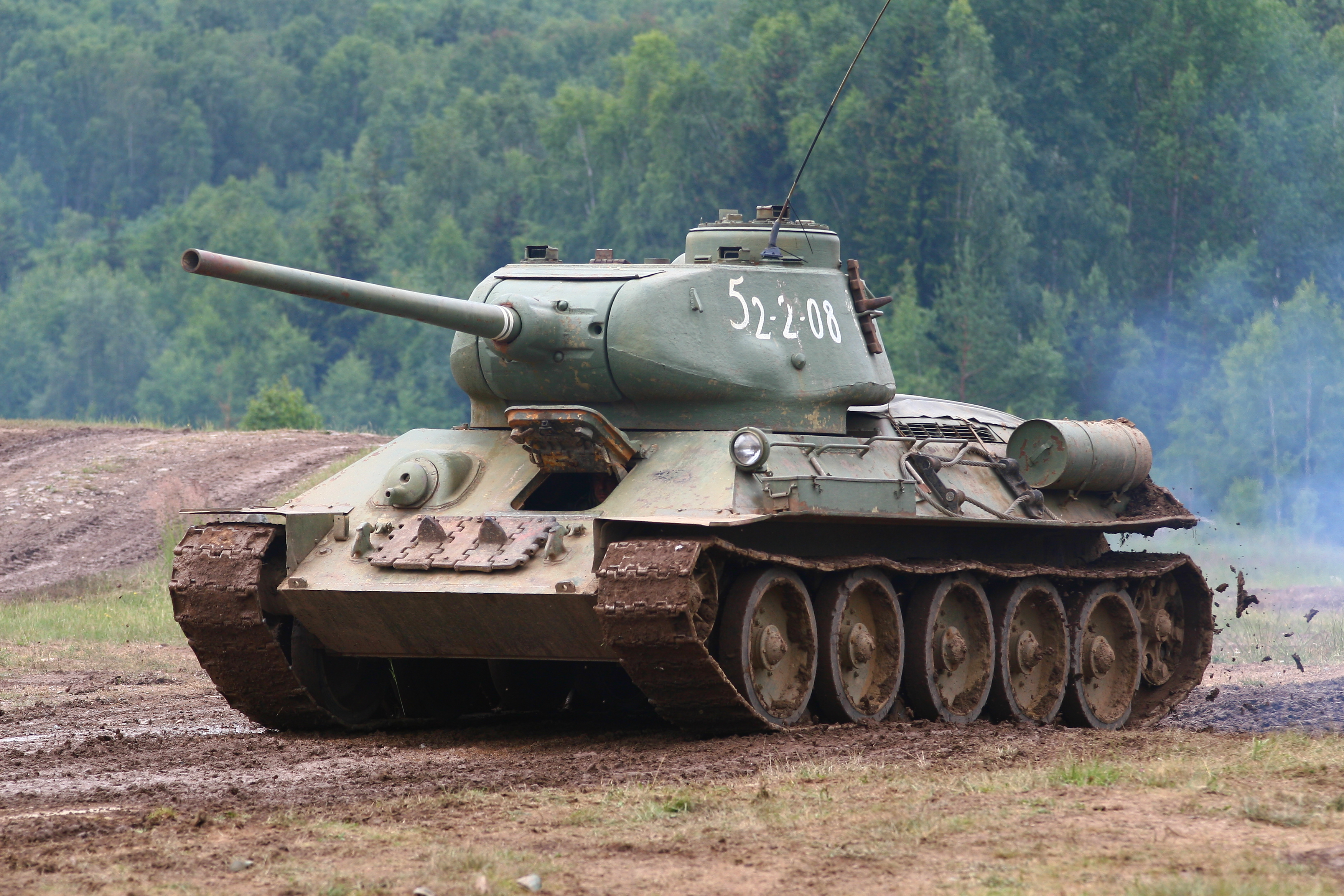 Vojenská technika zaznamenaná při dynamických ukázkách na Dni pozemního vojska BAHNA 2018, který pořádá Velitel společných sil a Nadace pozemního vojska AČR.